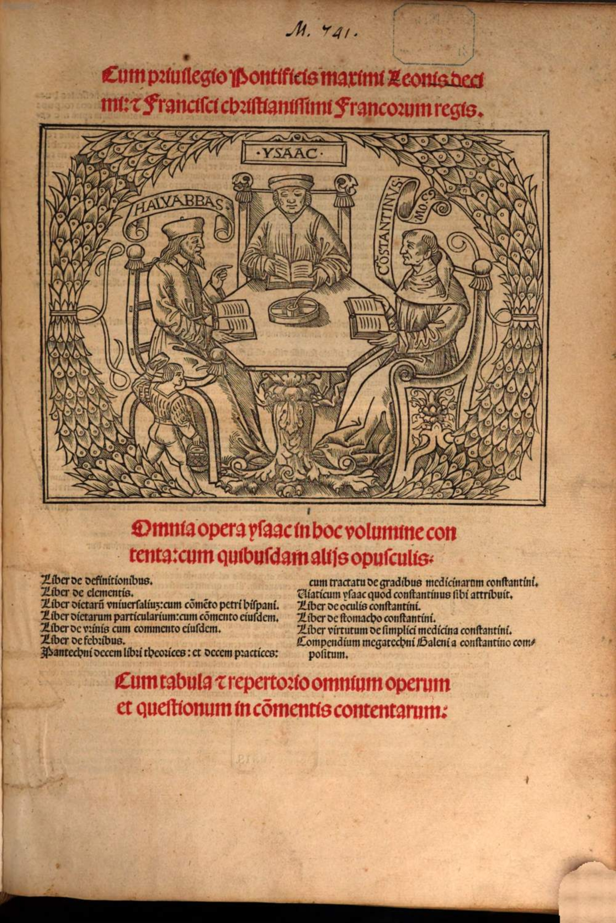 Isaak Israeli, Titelblatt der Gesamtausgabe mit Holzschnitt, Lyon 1515.